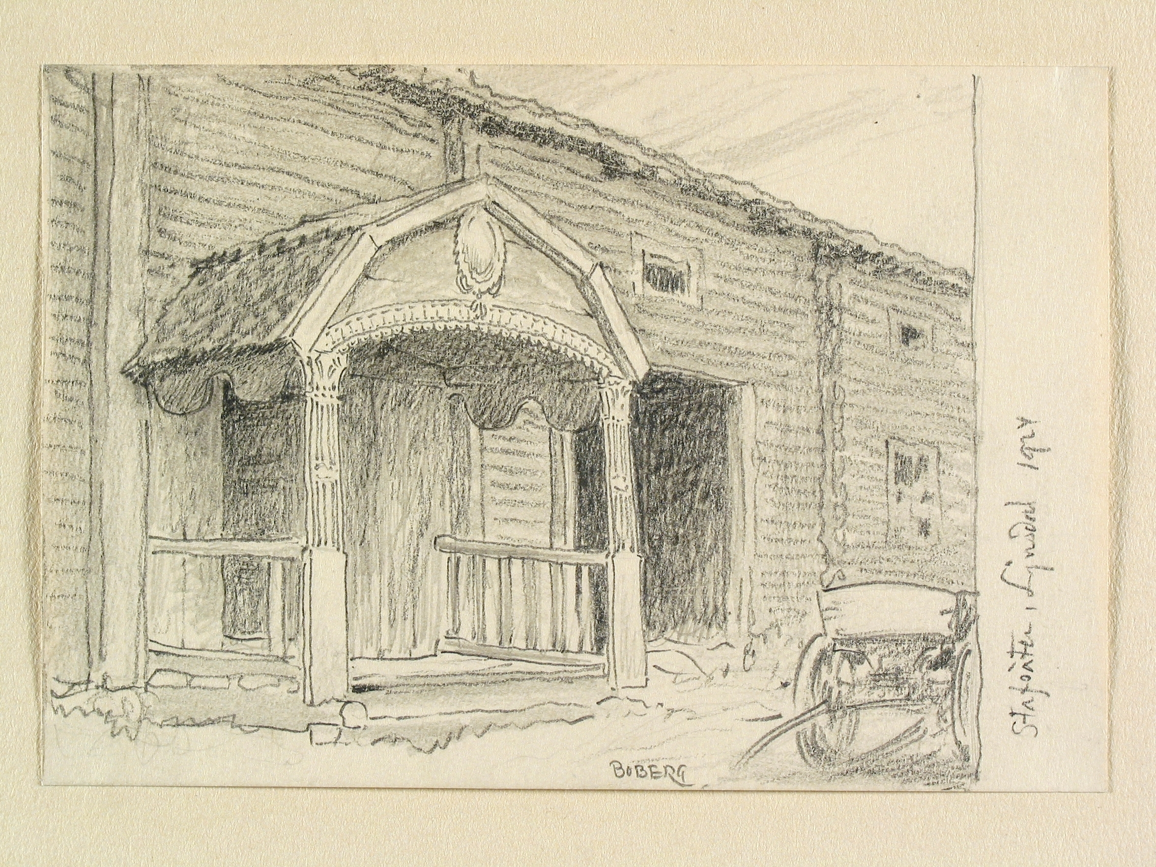 Hälsingland, Ljusdals sn., Stavsäter. Teckning av Ferdinand Boberg Depicted place: Ljusdals sn., Stavsäter (Ortnamn därutöver), Sweden (Q34)